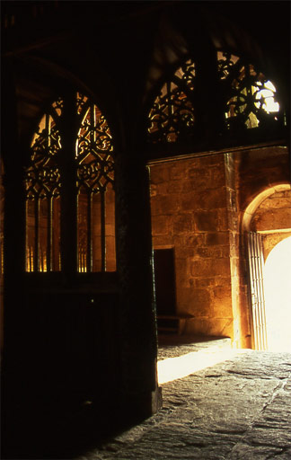 Description : Jubé de l'Église Saint Envel, Loc Envel, Côtes d'Armor Date : à préciser Auteur : Ifernyen Source : Archives personnelles Statut : GFDL Ifernyen